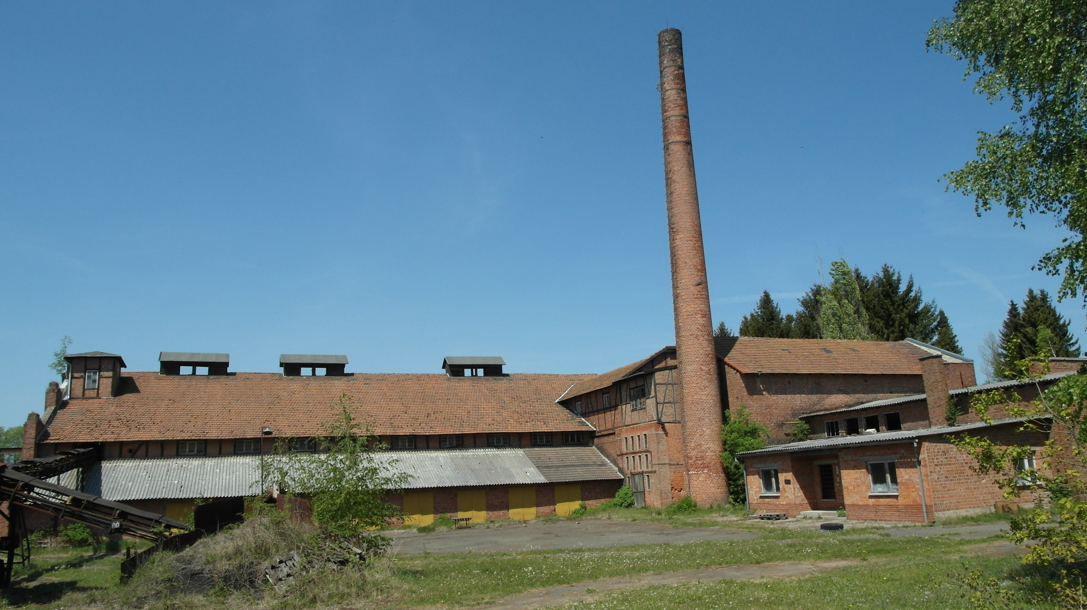 Ziegelei in Zwinge (Eichsfeld)